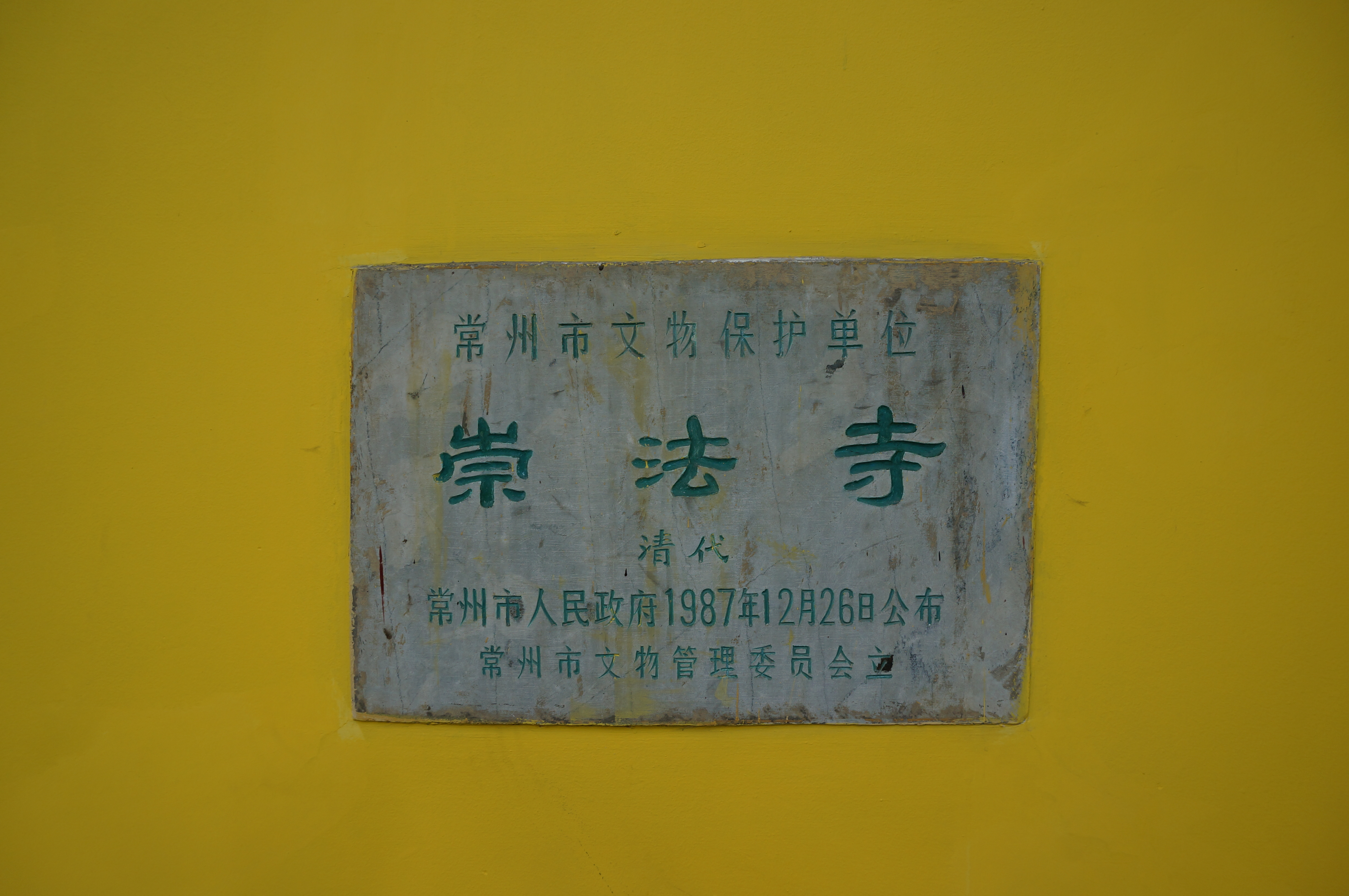 常州崇法寺大殿，市级文保碑。